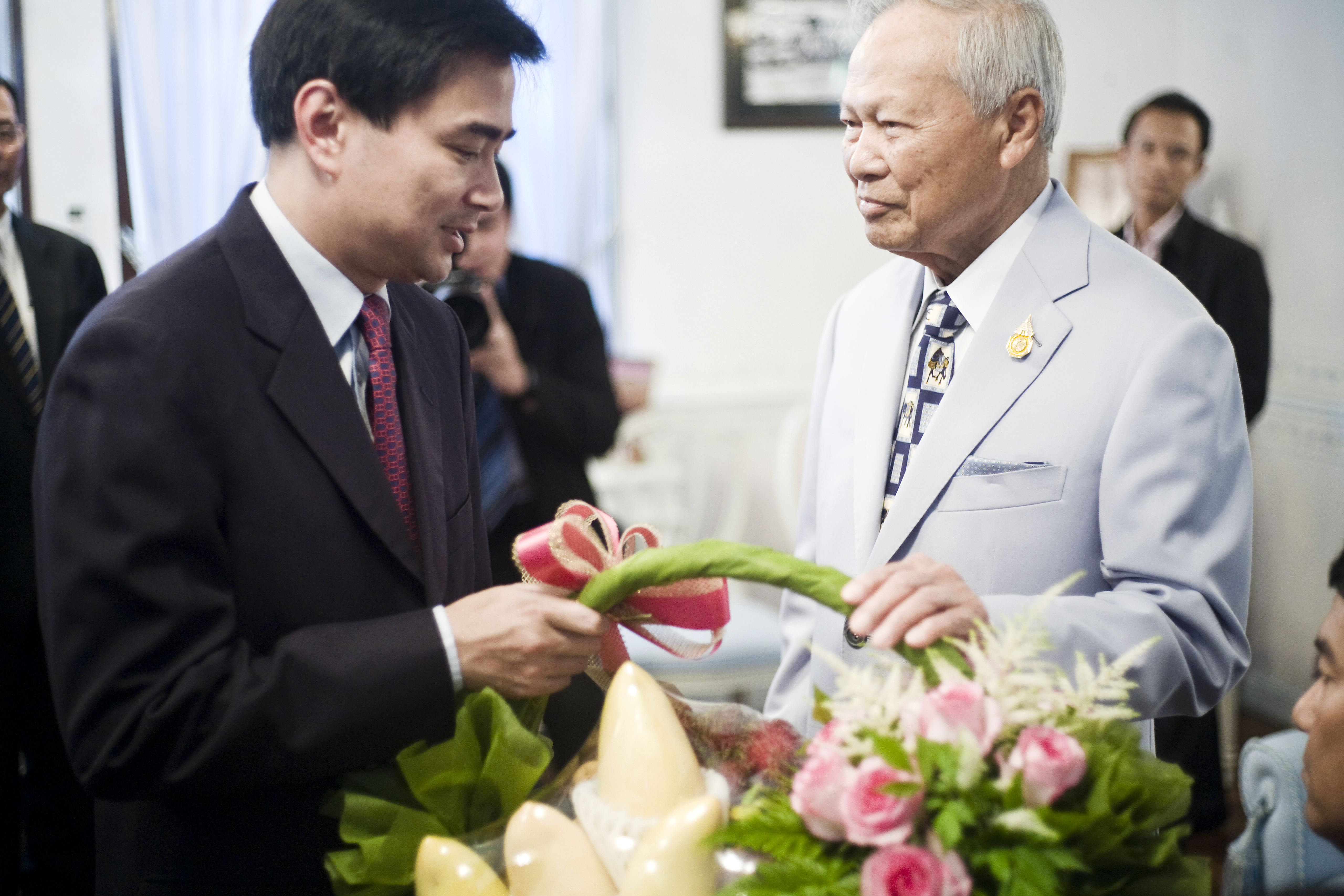 นายกรัฐมนตรี และคณะรัฐมนตรี เข้าอวยพรวันคล้ายวันเกิดพลเอก เปรม ติณสูลานนท์ ประธานองคมนตรีและรัฐบุรุษ นายกรัฐมนตรีของไทยคนที่ 16 ณ บ้านสี่เสาเทเวศร์ 25สิงหาคม2552 (The Official Site of The Prime Minister of Thailand Photo by พีรพัฒน์ วิมลรังครัตน์)